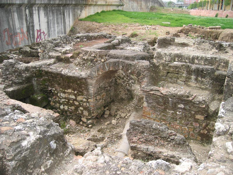 Yacimiento arqueológico de Cercadilla, en Córdoba (España). Vista parcial de lo excavado.